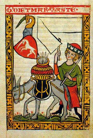 1 = Darstellung des Minnesängers Dietmar von Aste (auch Dietmar von Aist, * vor 1140; † nach 1171).